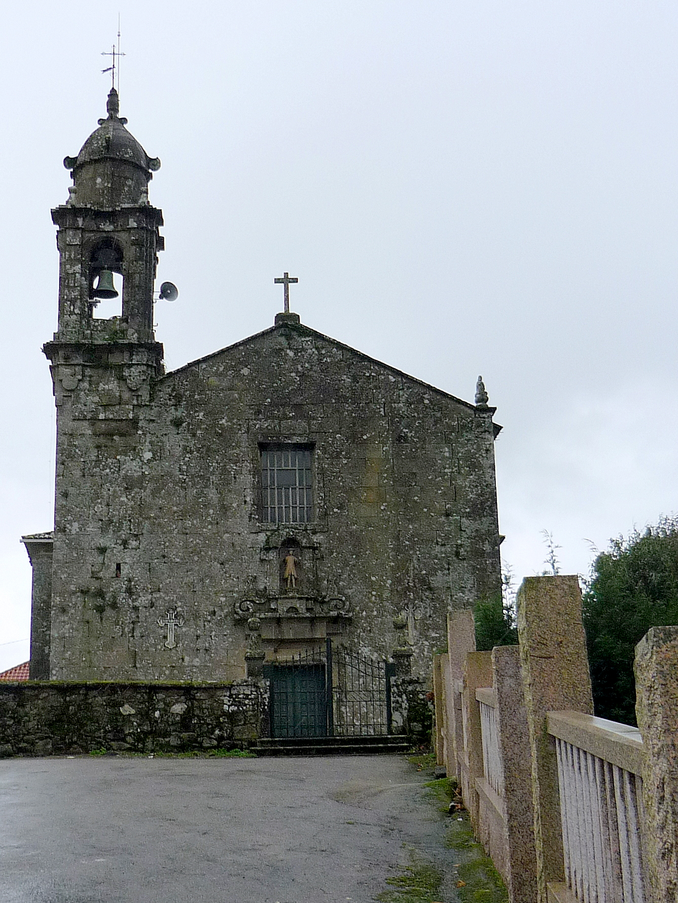 Igrexa de San Xián de Laíño, Dodro